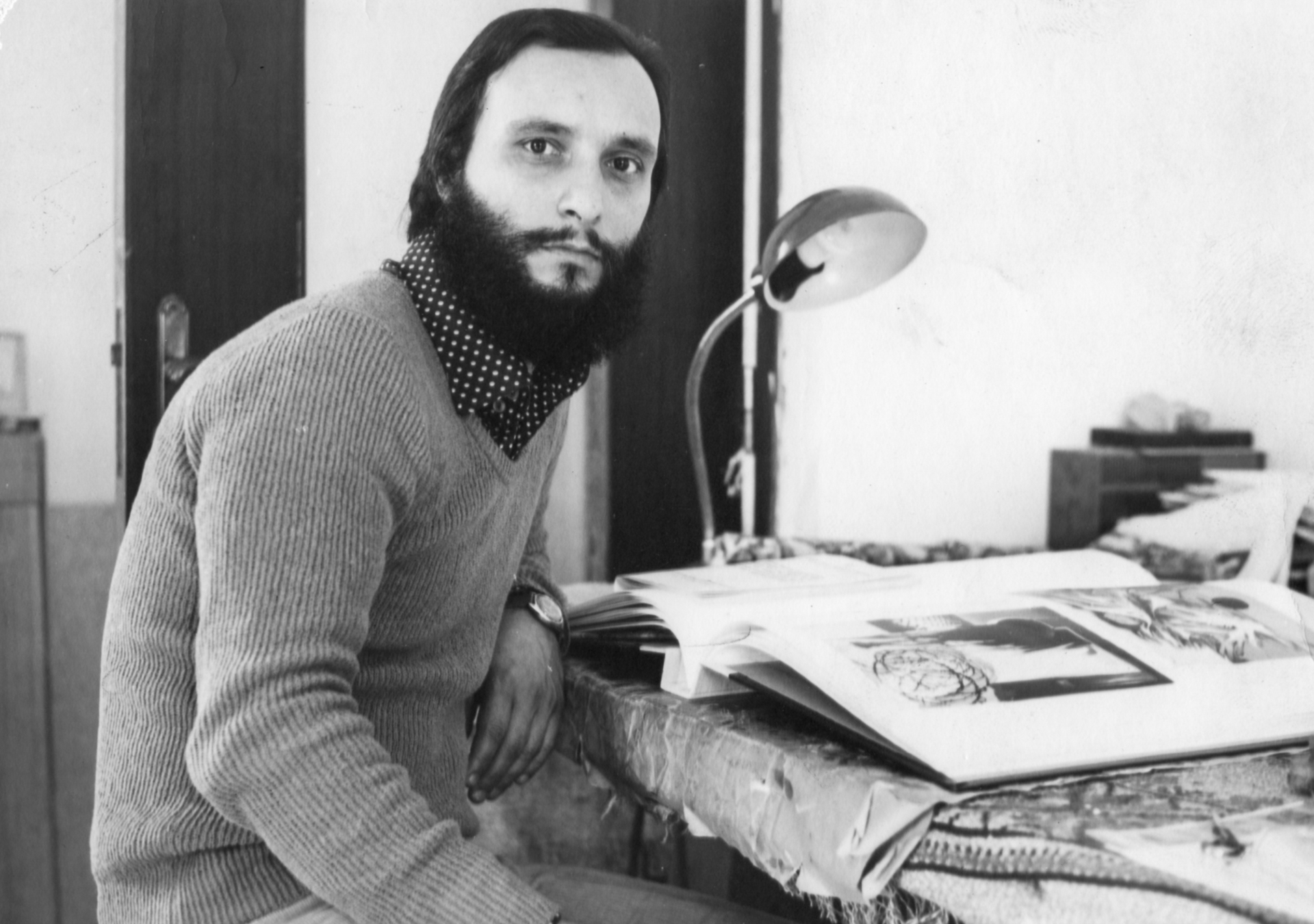 Oscar Pelosi nel suo studio di Cremona - 1974